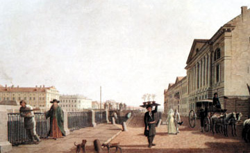 Набережная реки Фонтанки. Справа – дворец графини И. И. Воронцовой.